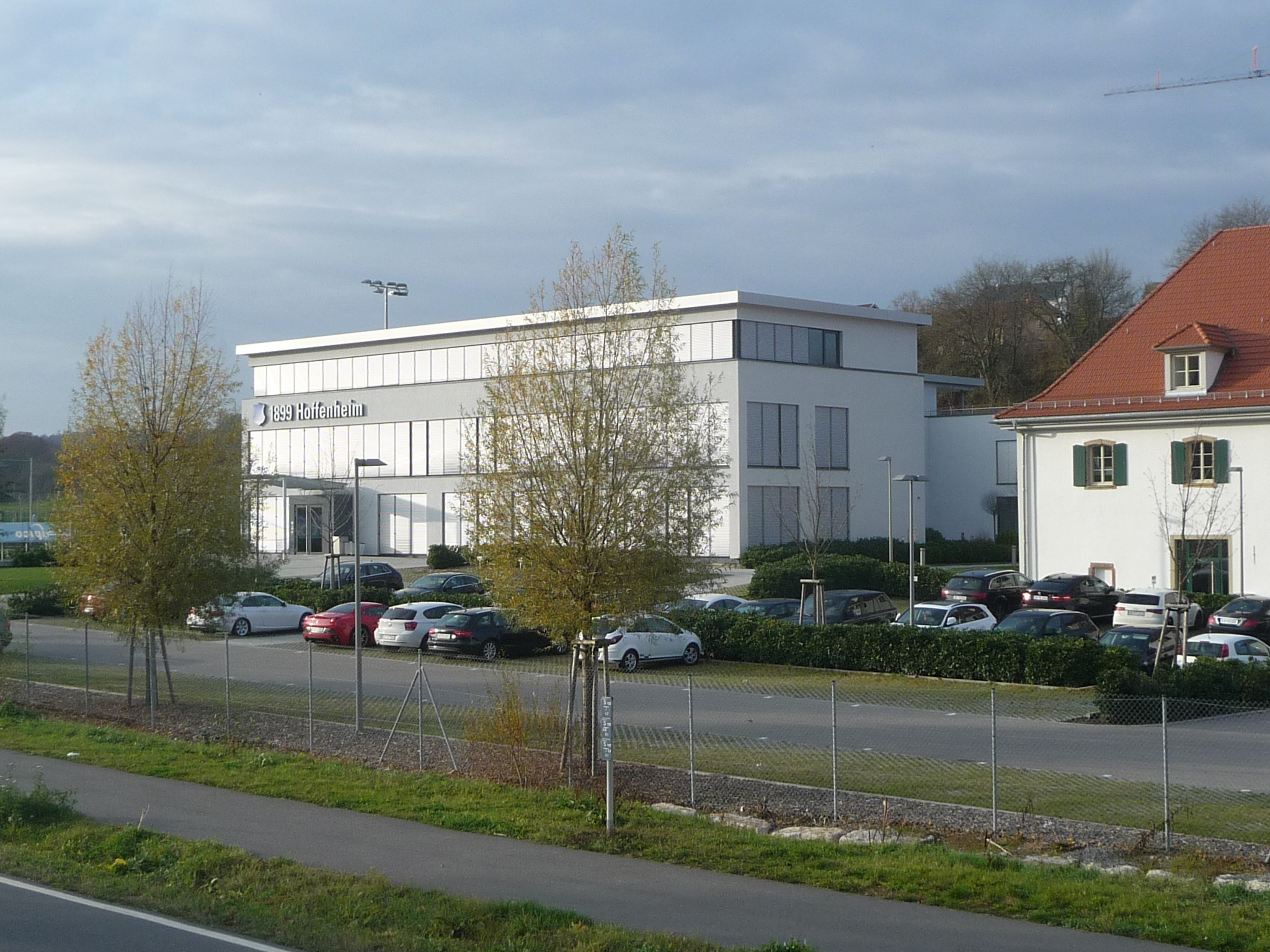 Zuzenhausen ist eine Gemeinde in Baden-Württemberg und gehört zum Rhein-Neckar-Kreis.